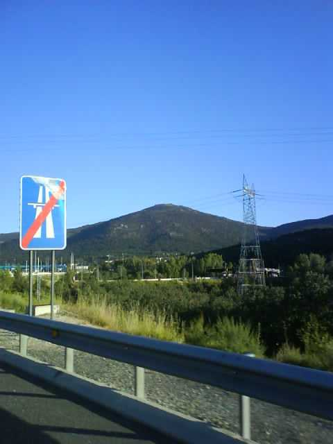 Cueva Valiente. El Espinar, Segovia, España.